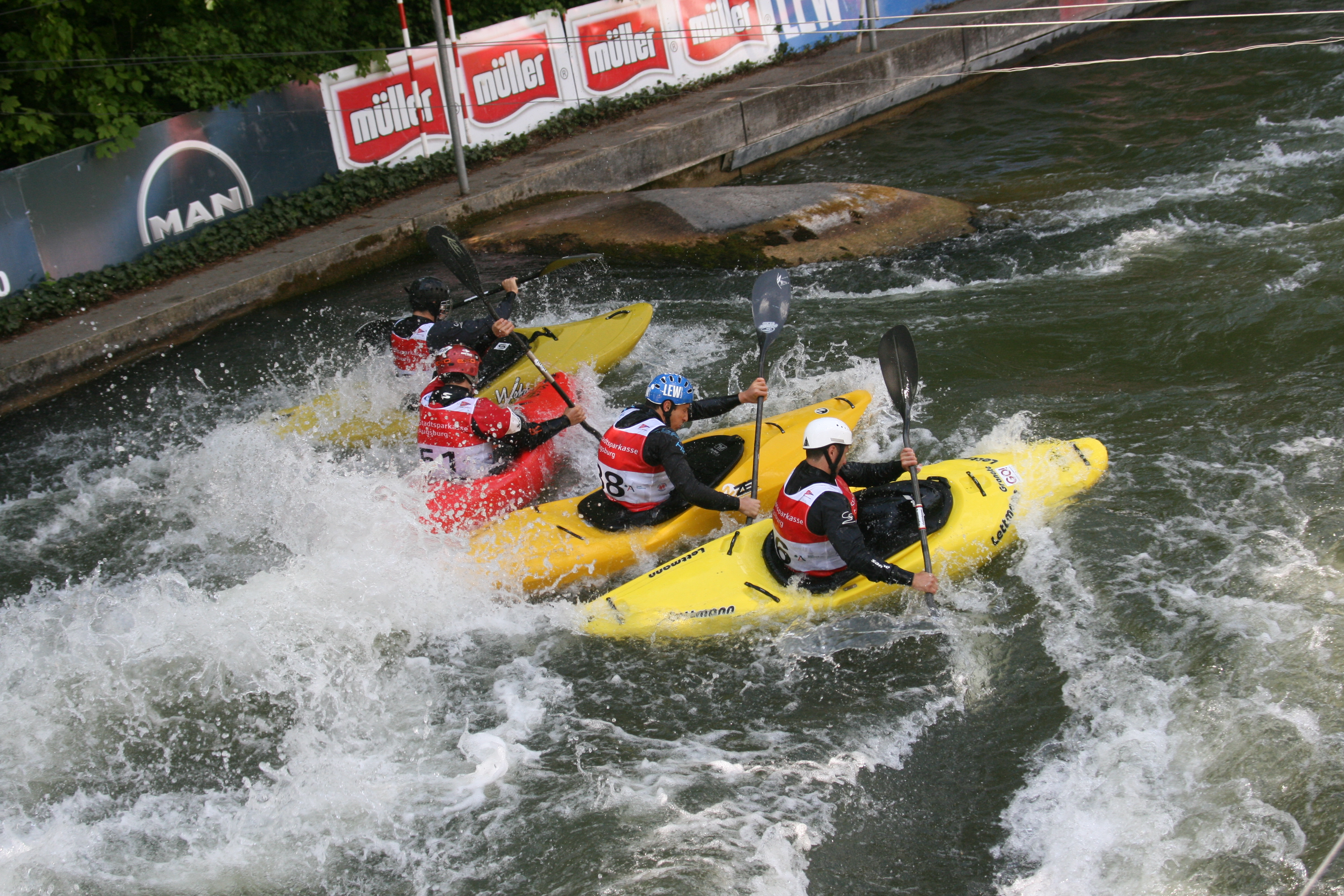 Boater Cross auf dem Eiskanal in Augsburg